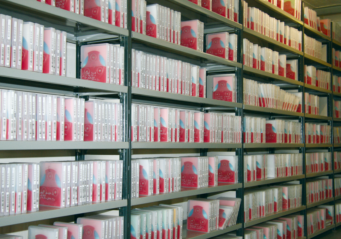 Daisy-Bücher im Regal